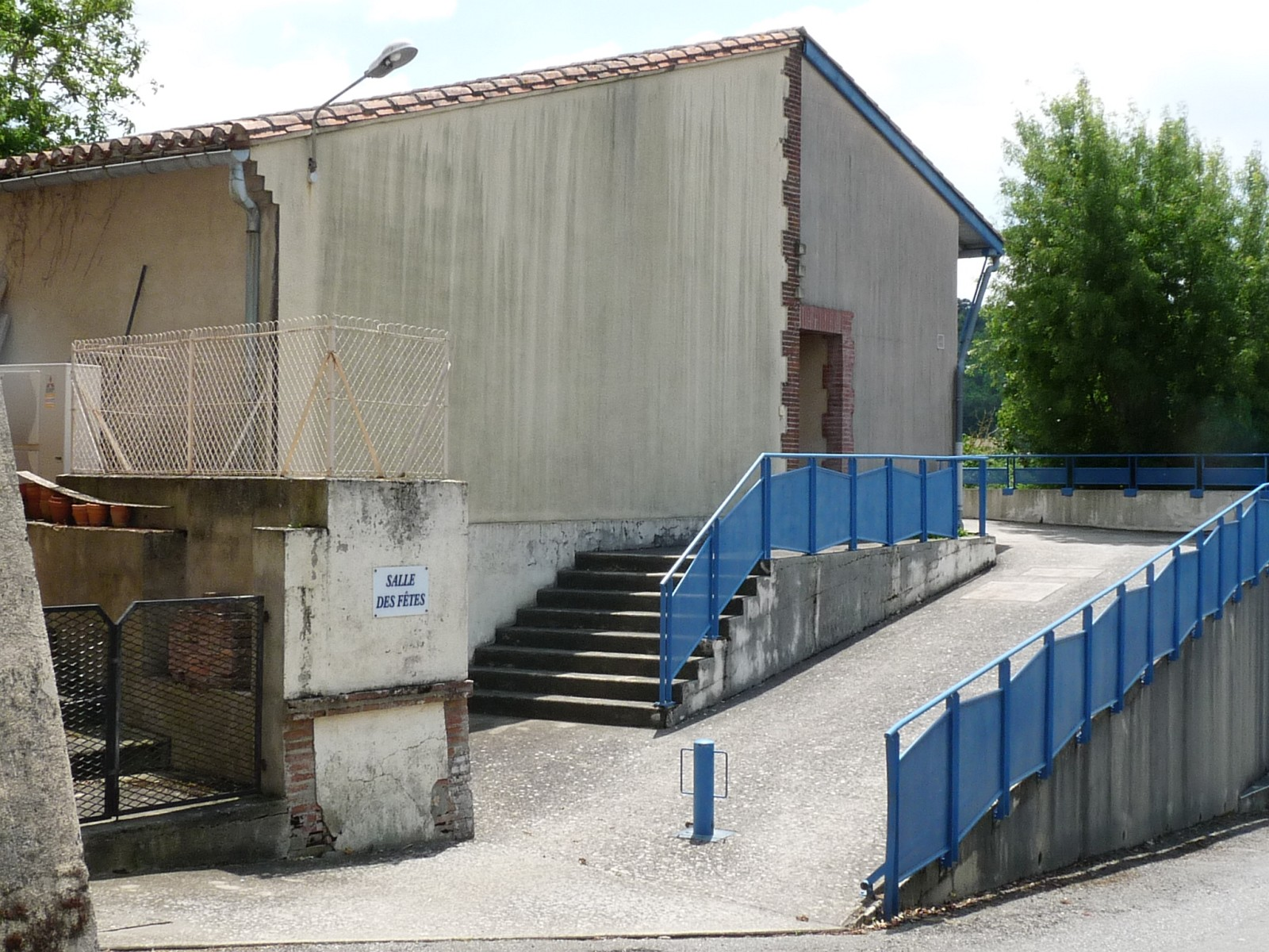 Salle des fêtes, Ségreville, Haute-Garonne, France